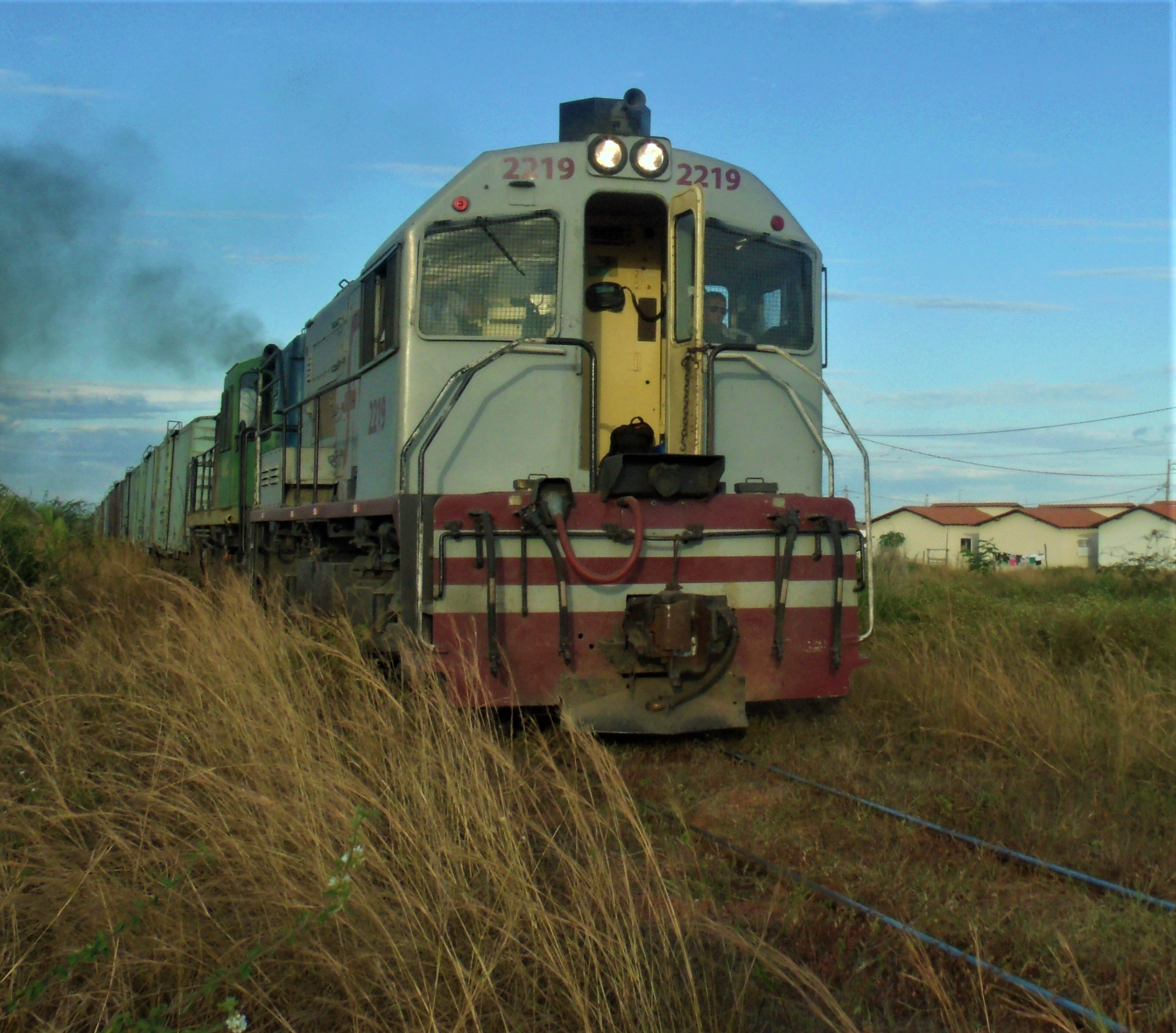 Trem cargueiro na Ferrovia Teresina-Fortaleza nas imediações de Altos, n Piauí, Brasil.